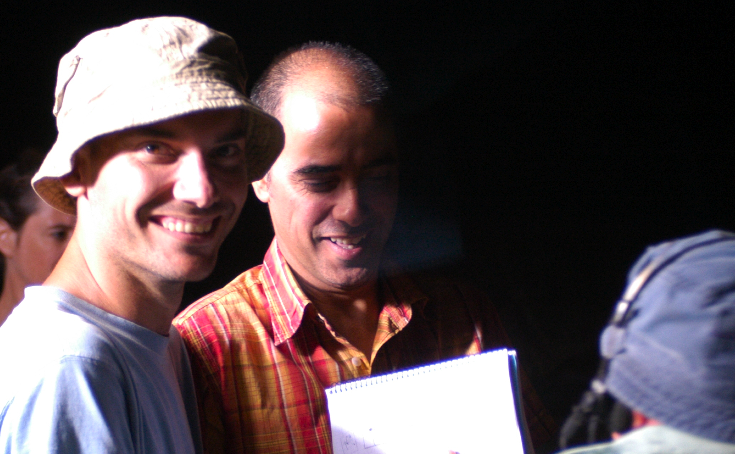 Javier Gutiérrez durante el rodaje de "3 Días"